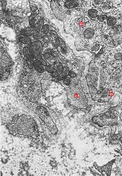 Nerv-Epithelbeziehung im elektronenmikroskopischen Bild beim Juxtaoralen Organ, W. Zenker